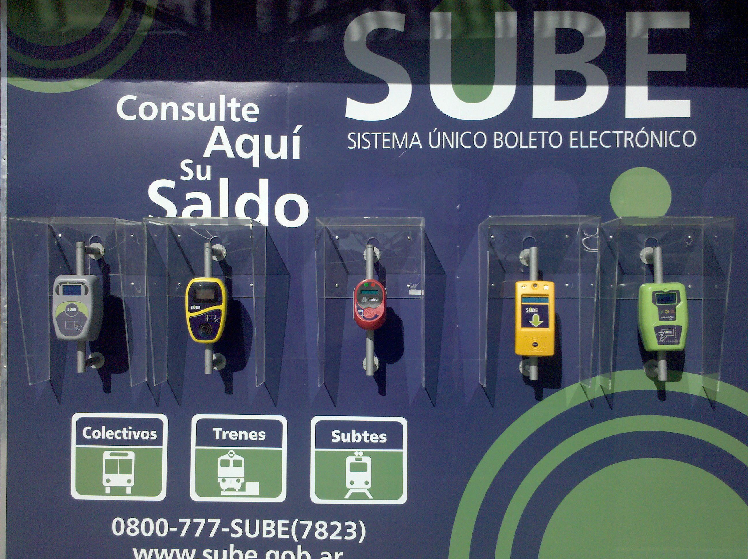 Validadores de tarjeta SUBE en Tecnópolis